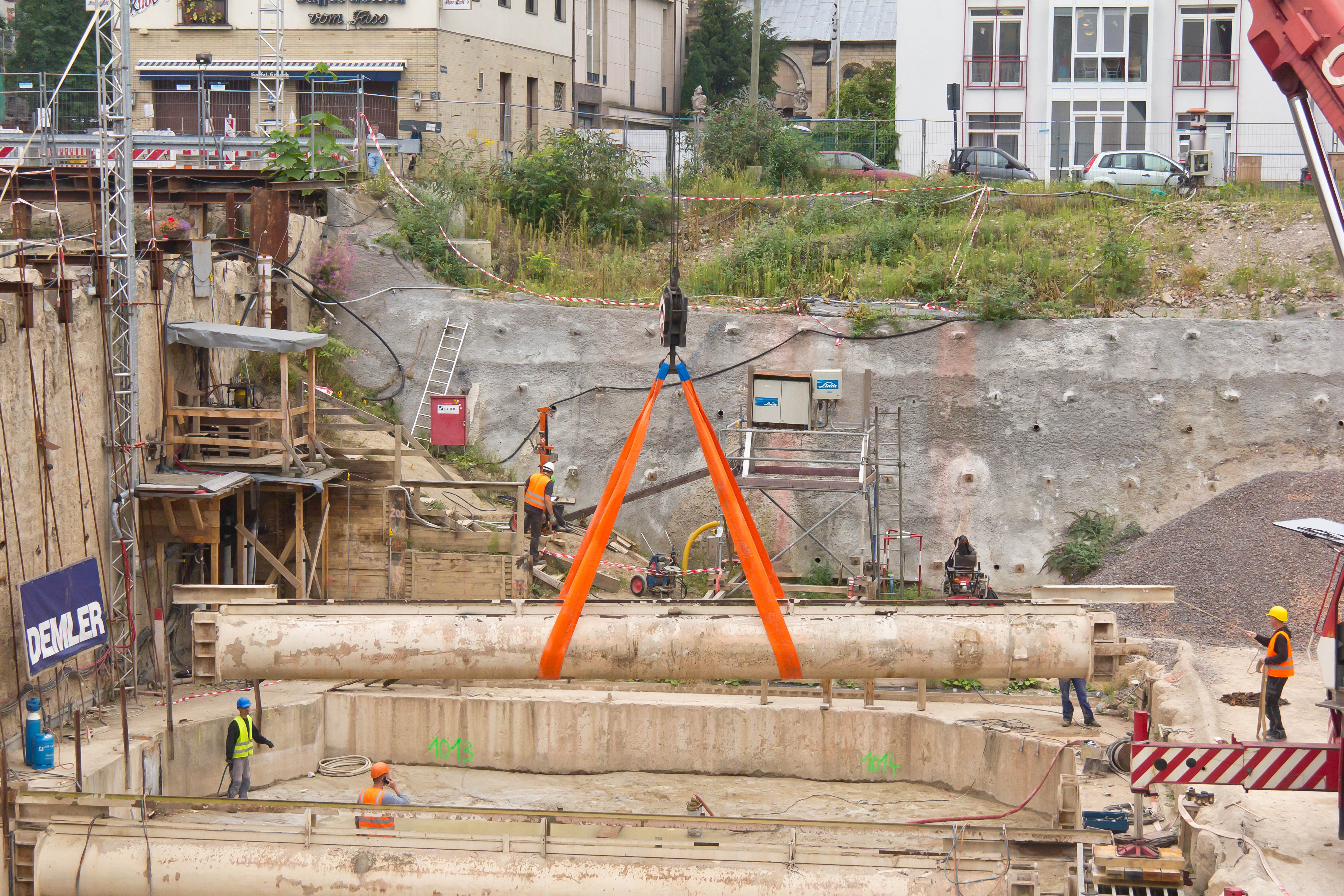 Abschließende Arbeiten zum Rückbau des Bergungsbauwerks auf dem Gelände des früheren Stadtarchivs am Waidmarkt. Eine von 3 Stahlrohrstützen aus dem Bergungsbauwerk mit einer Länge rund 14 Metern hängt an einem Gurt als Anschlagmittel an Haken eines Mobilkrans